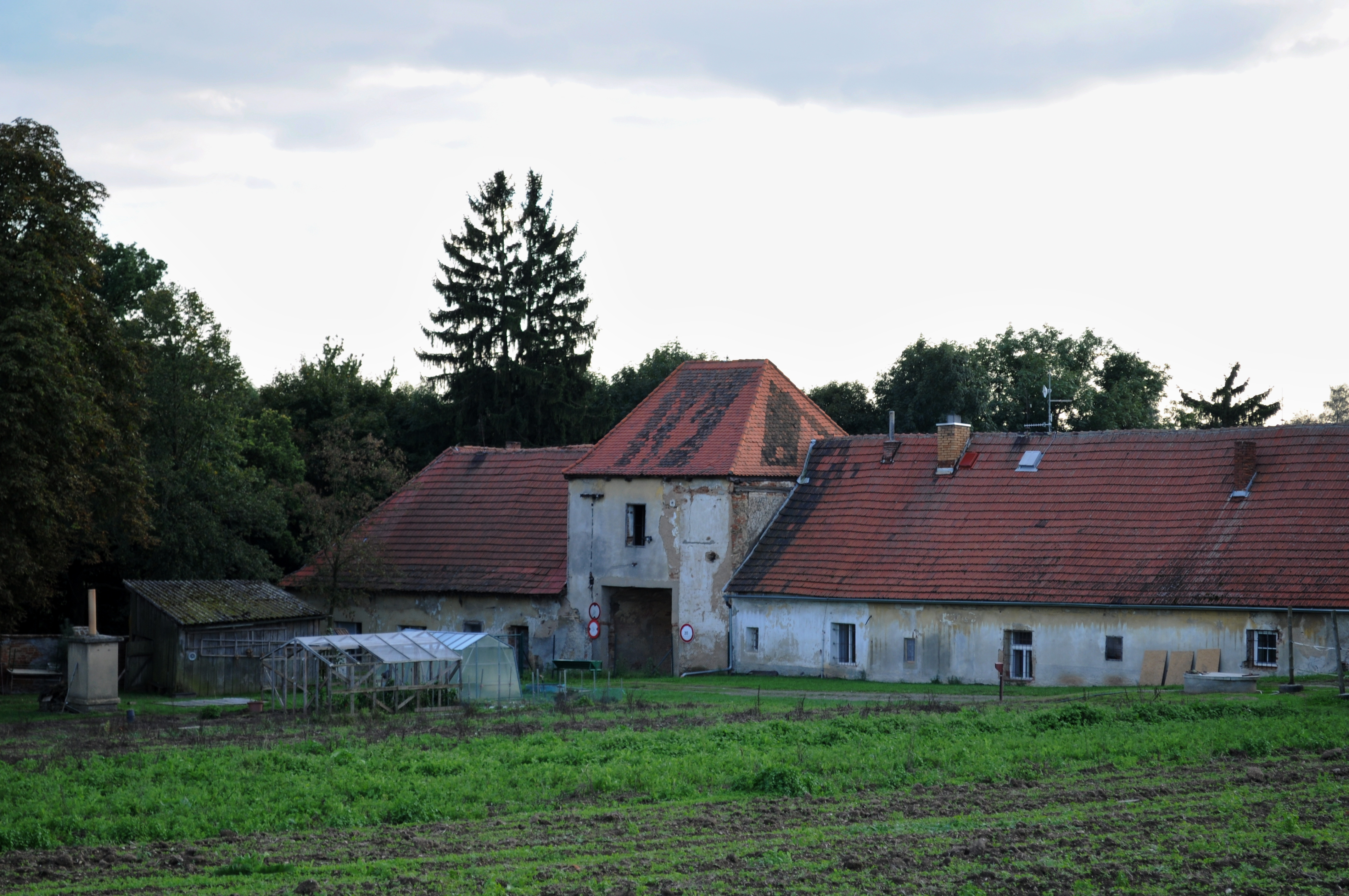 Zámek Chříč, Chříč 1, Chříč.